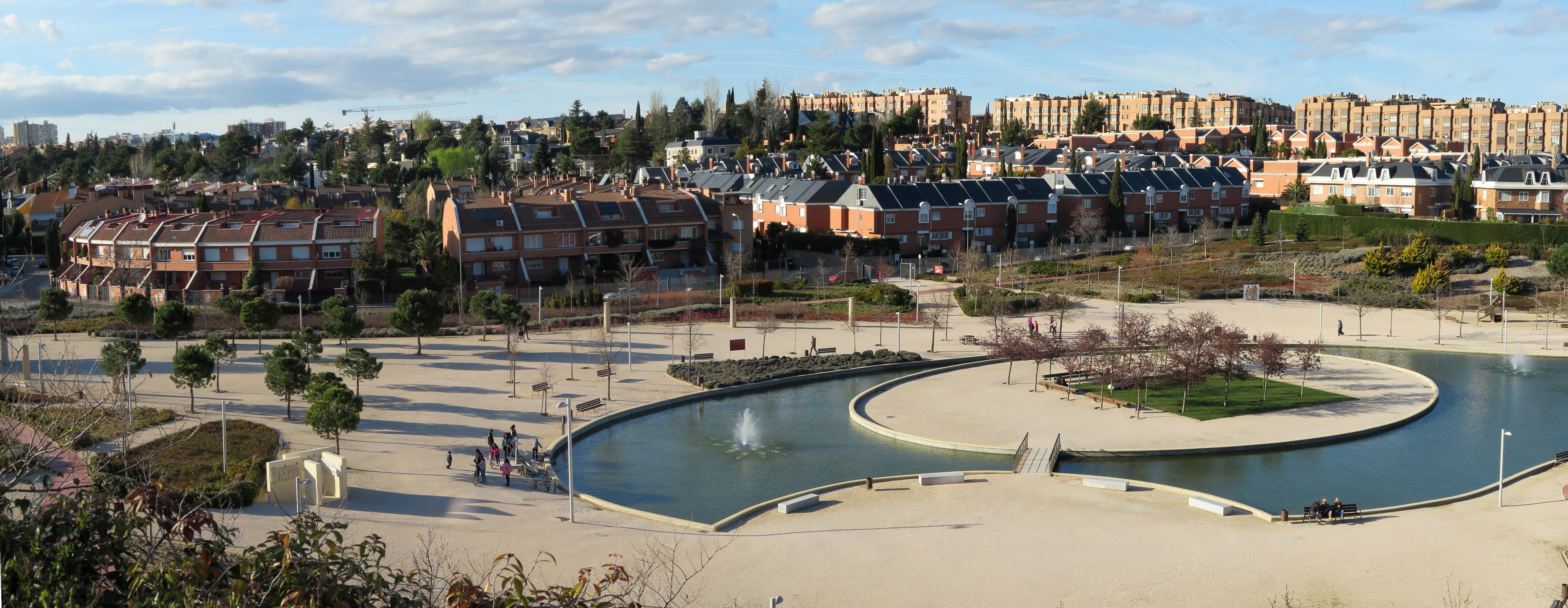 Piovera (Madrid), panorámica desde el parque Juan Pablo II